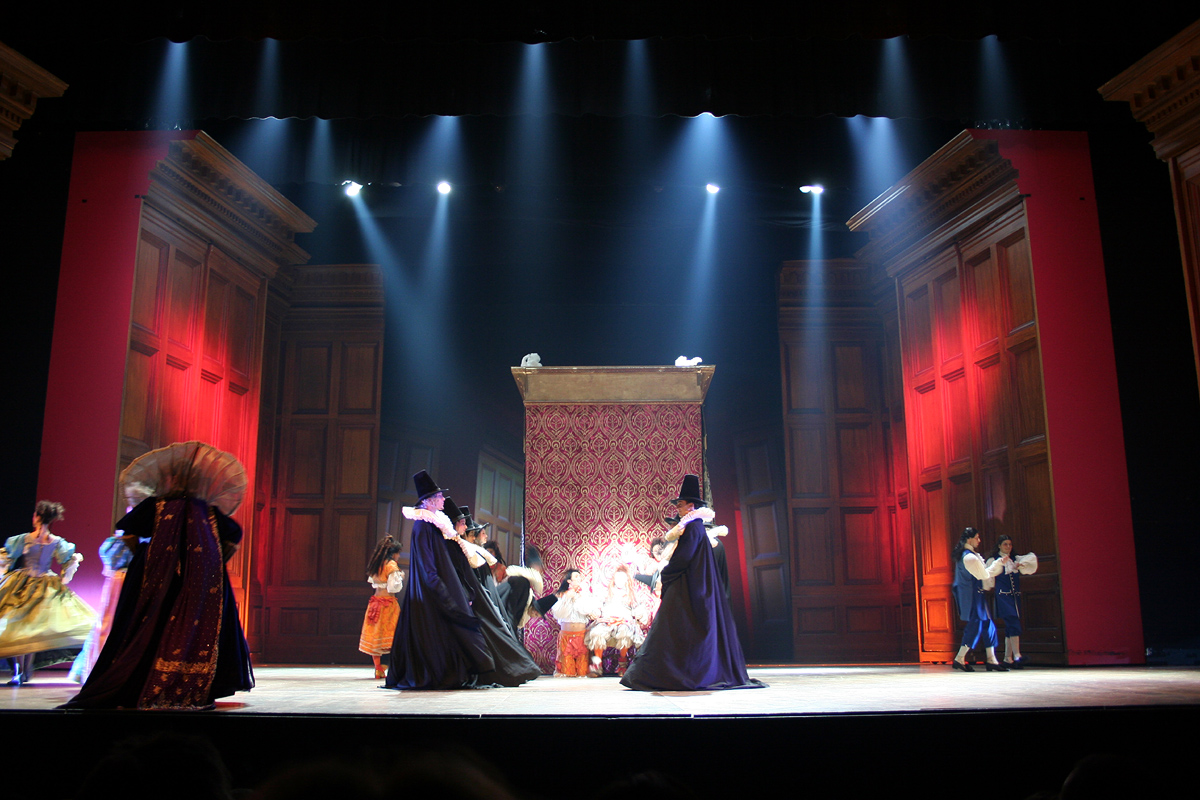 Le Roi Soleil, Musical show in Paris (Palais des Sports), France